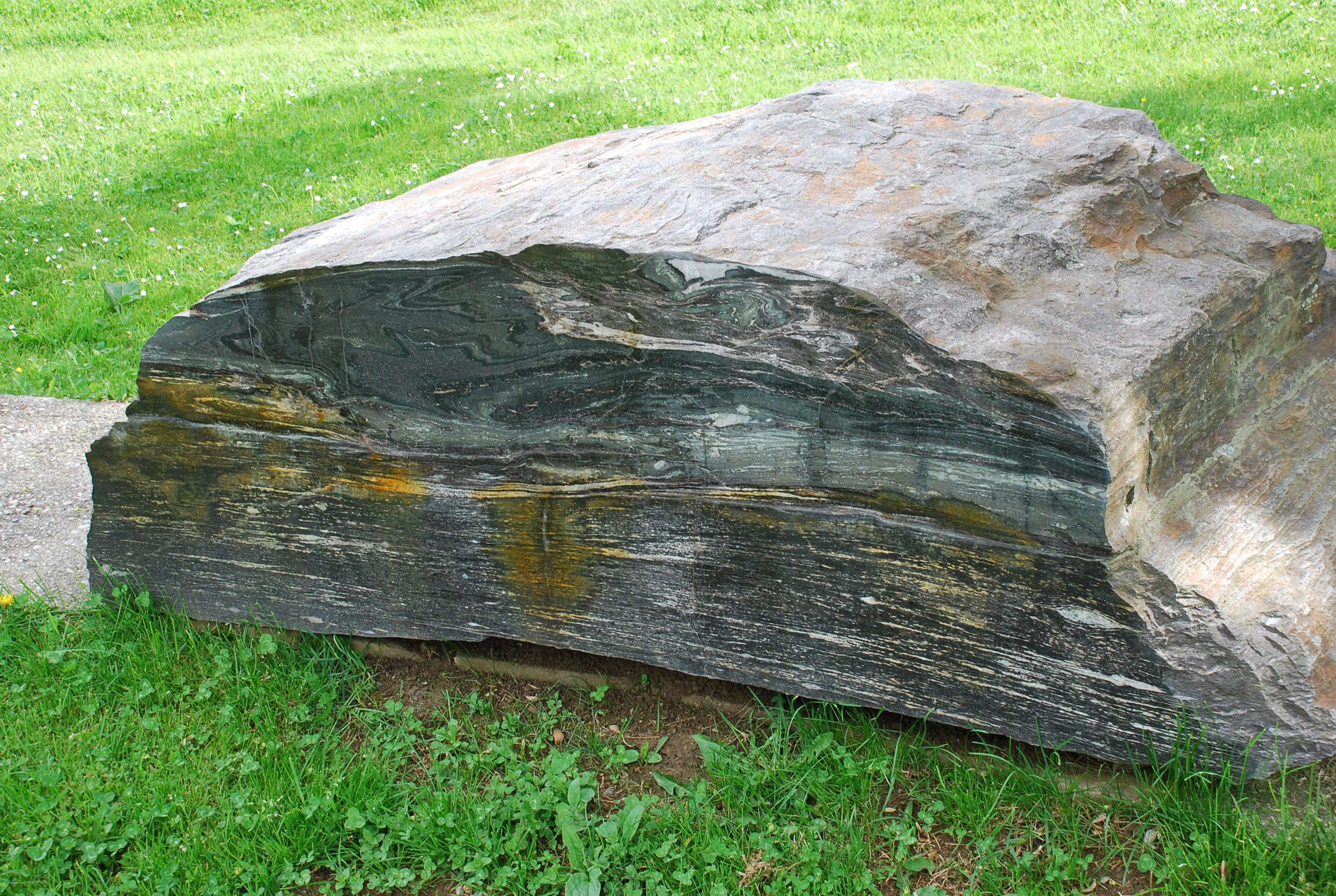 Plattengneis mit Eklogitamphibolit im Geopark Glashütten, Block Nr. 4. Übertragung des frei zugänglichen Textes der Erläuterungsplatte: „Plattengneis mit Eklogitamphibolit. Steinbruch der Firma Rath, Rachling bei Stainz. Dieser Plattengneis beinhaltet als Besonderheit eine Lage von Eklogitamphibolit. Vor rund 275 Millionen Jahren als glutflüssige, basaltische Schmelze in die damaligen Gesteine eingedrungen, erfolgte vor rund 100 Millionen Jahren bei sehr hohen Druck- und Temperaturbedingungen die Umwandlung in Eklogit und danach Eklogitamphibolit.“ Plattengneis bräunlich/weiß gebändert (mit Rostflecken aufgrund des enthaltenen Eisens), Eklogitamphibolit bläulich/grünlich